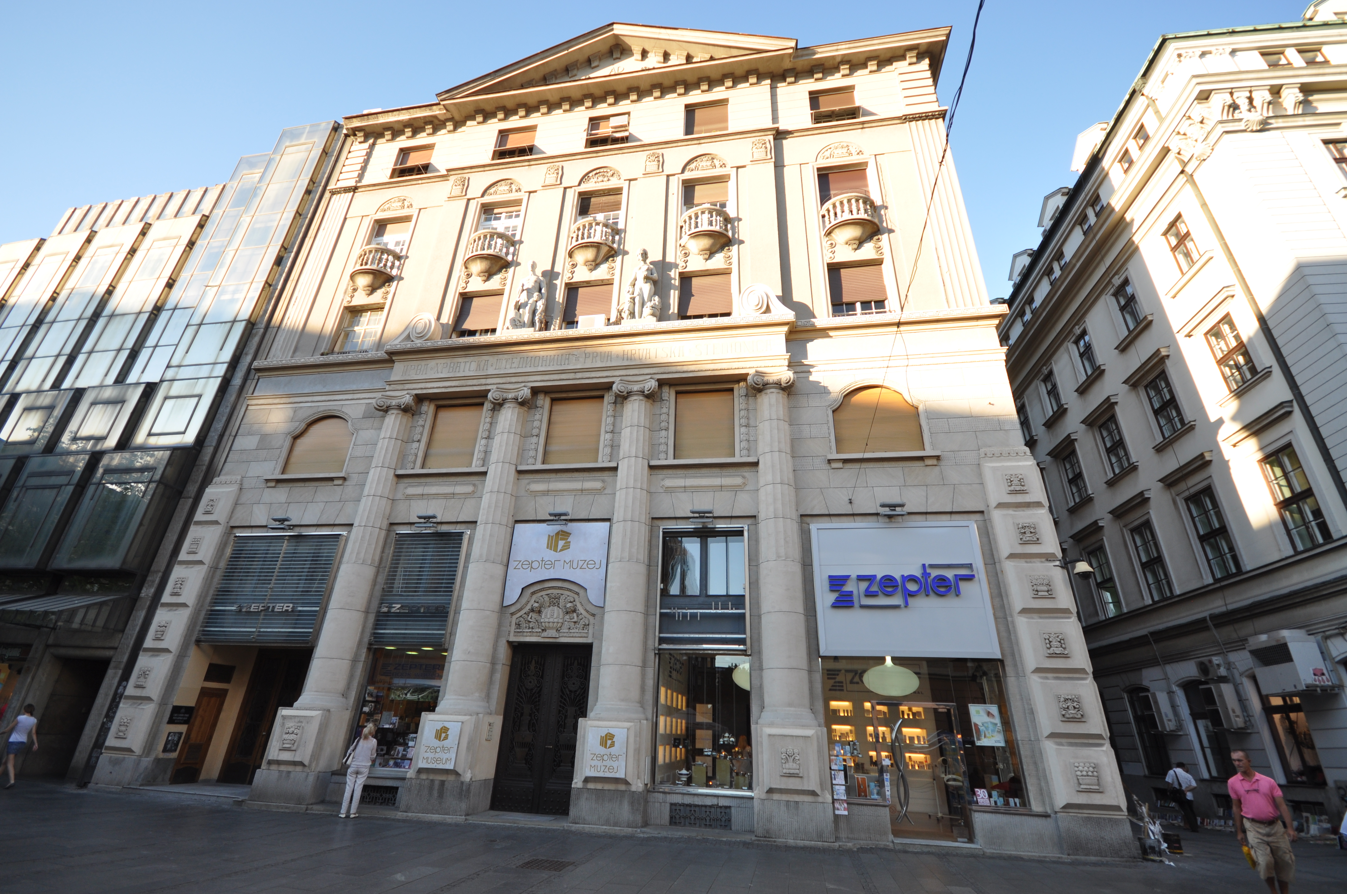 Zepter Muzej - Knez Mihailova